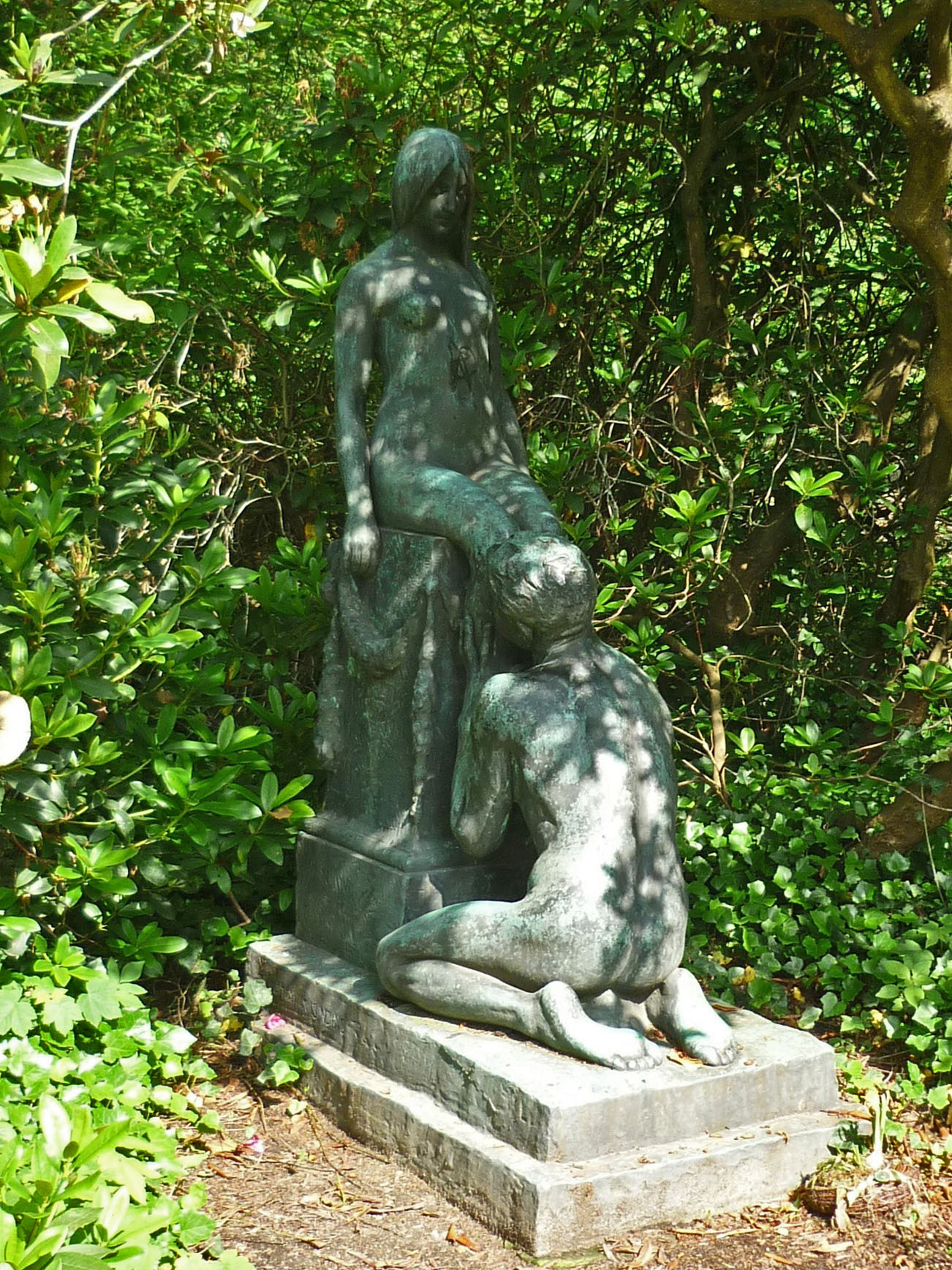 Plastik von Stephan Abel Sinding (1846-1922) im Schlosspark Thürmsdorf in der Sächsischen Schweiz